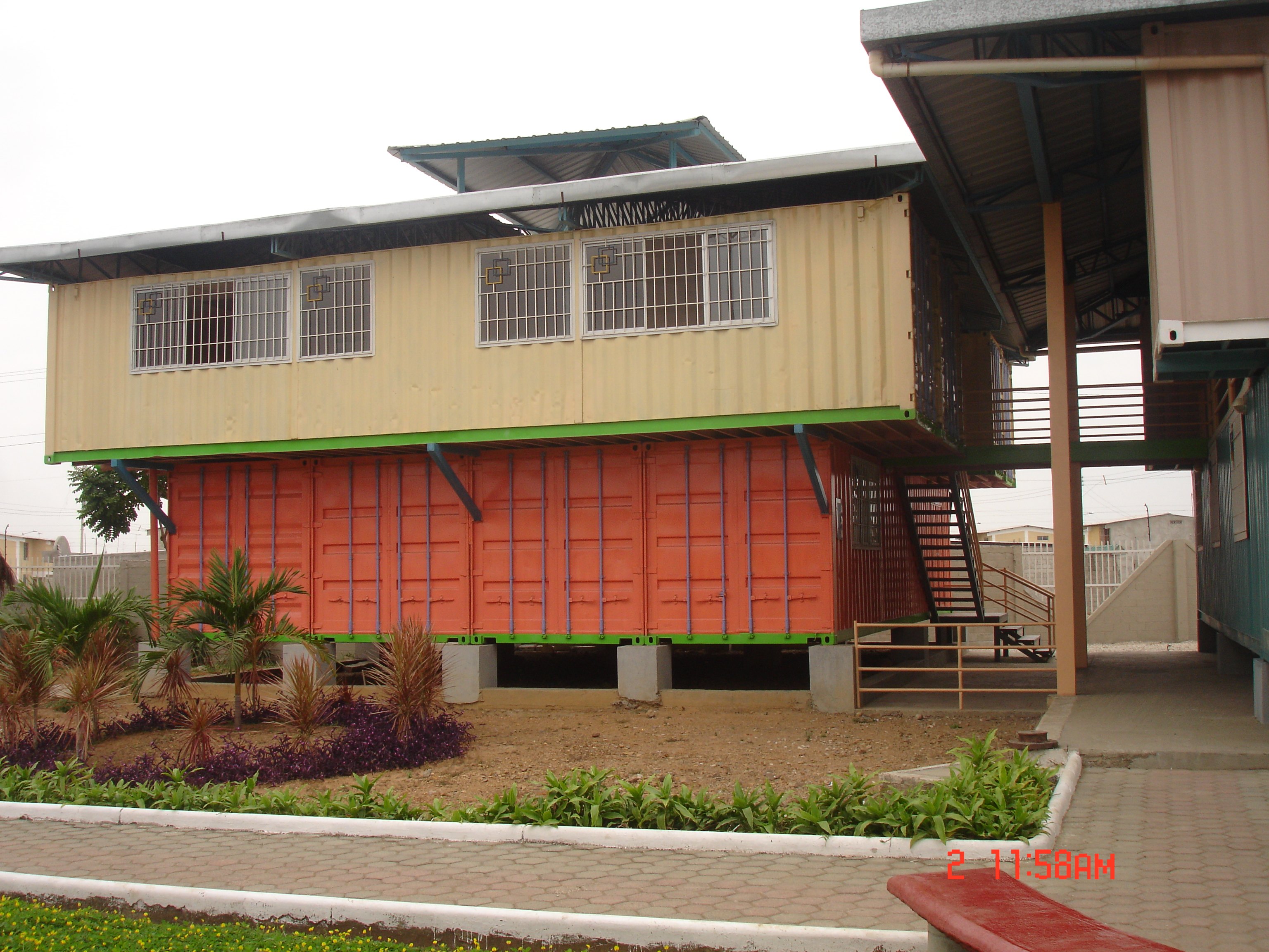 Reutilización de contenedores marítimos en un centro de capacitación. Bastión Popular. Guayaquil, Ecuador.